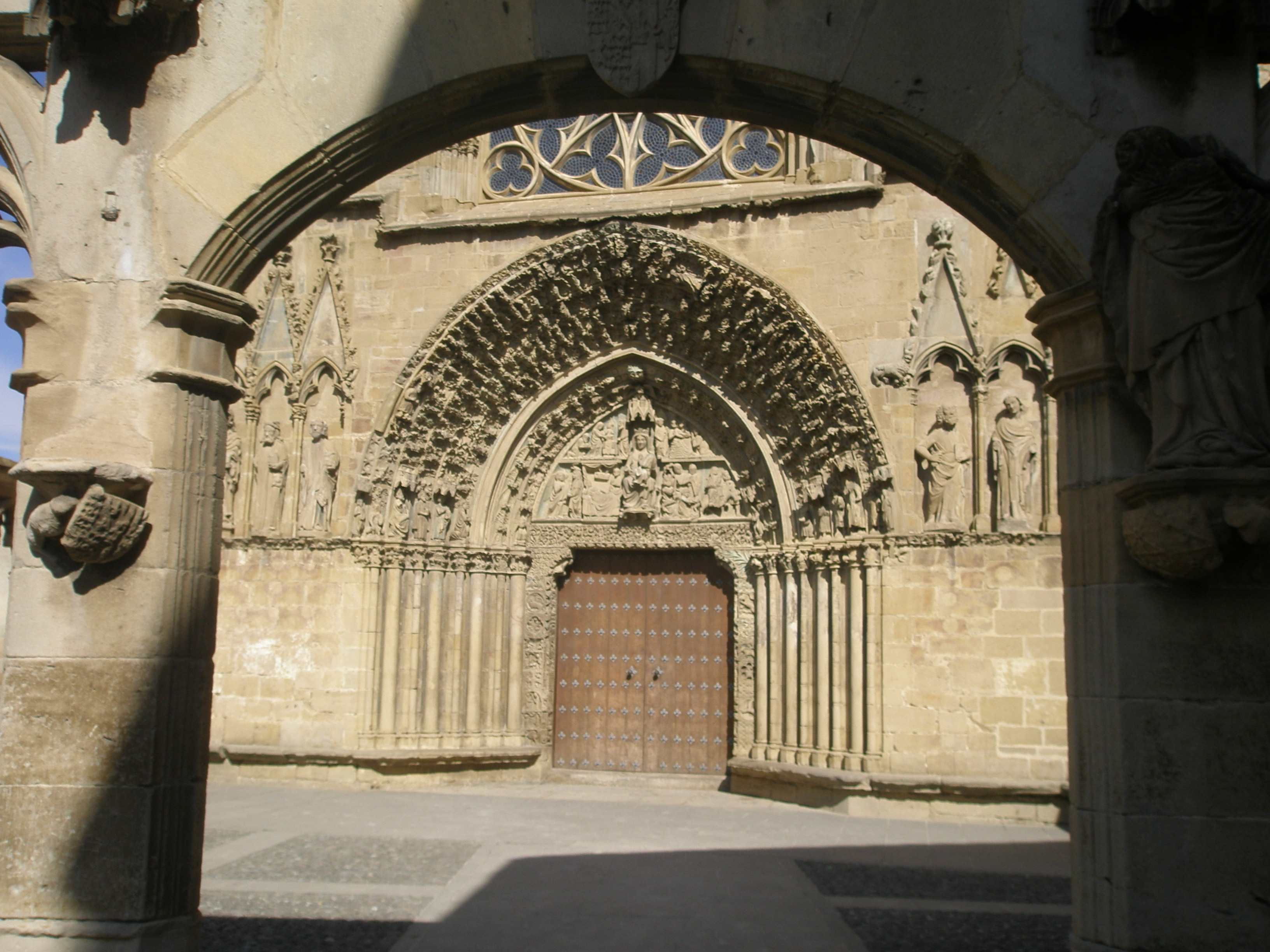 Iglesia de Santa María la Real de Olite, Navarra